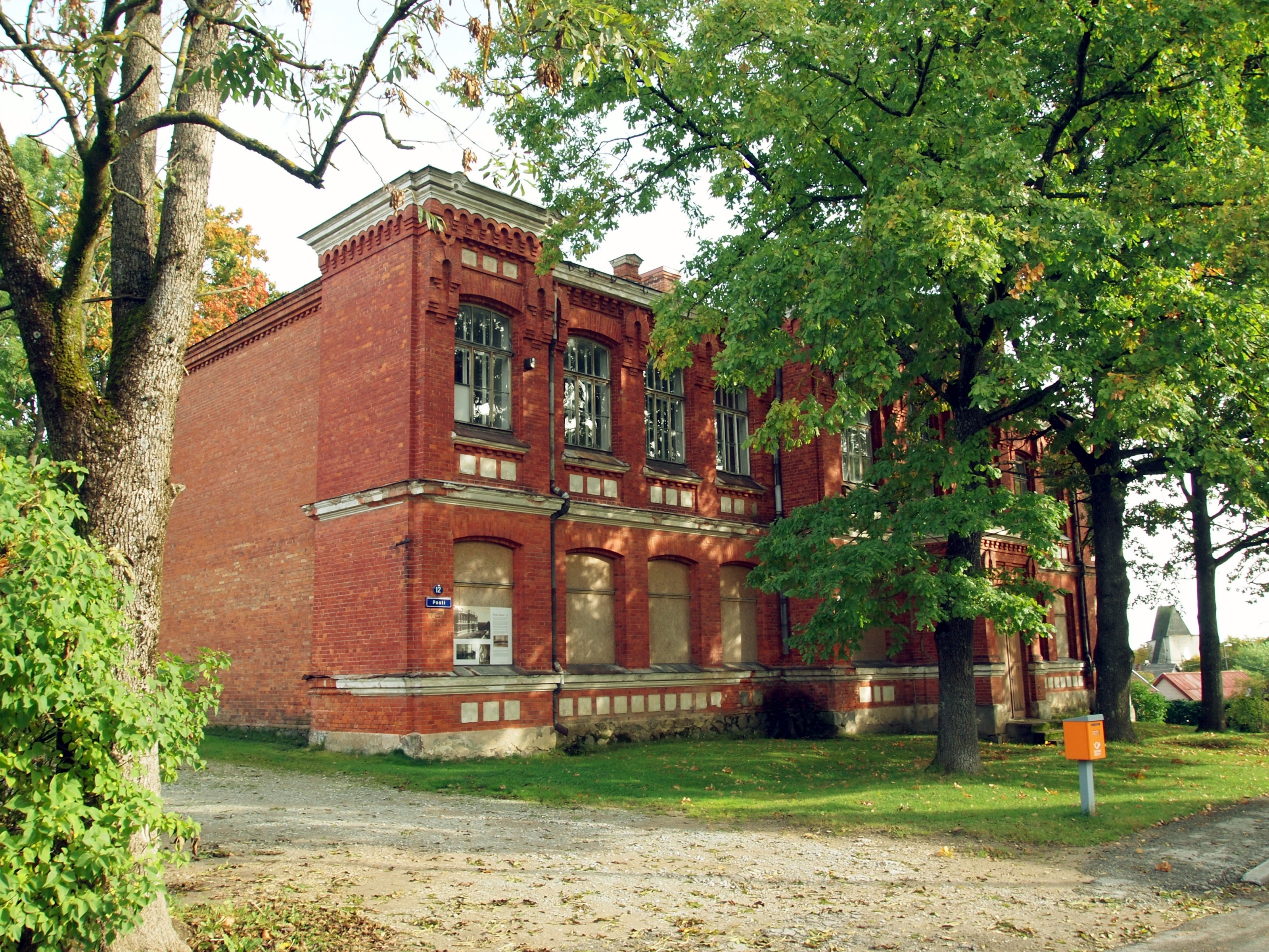 Paide Tütarlastegümnaasiumi hoone.